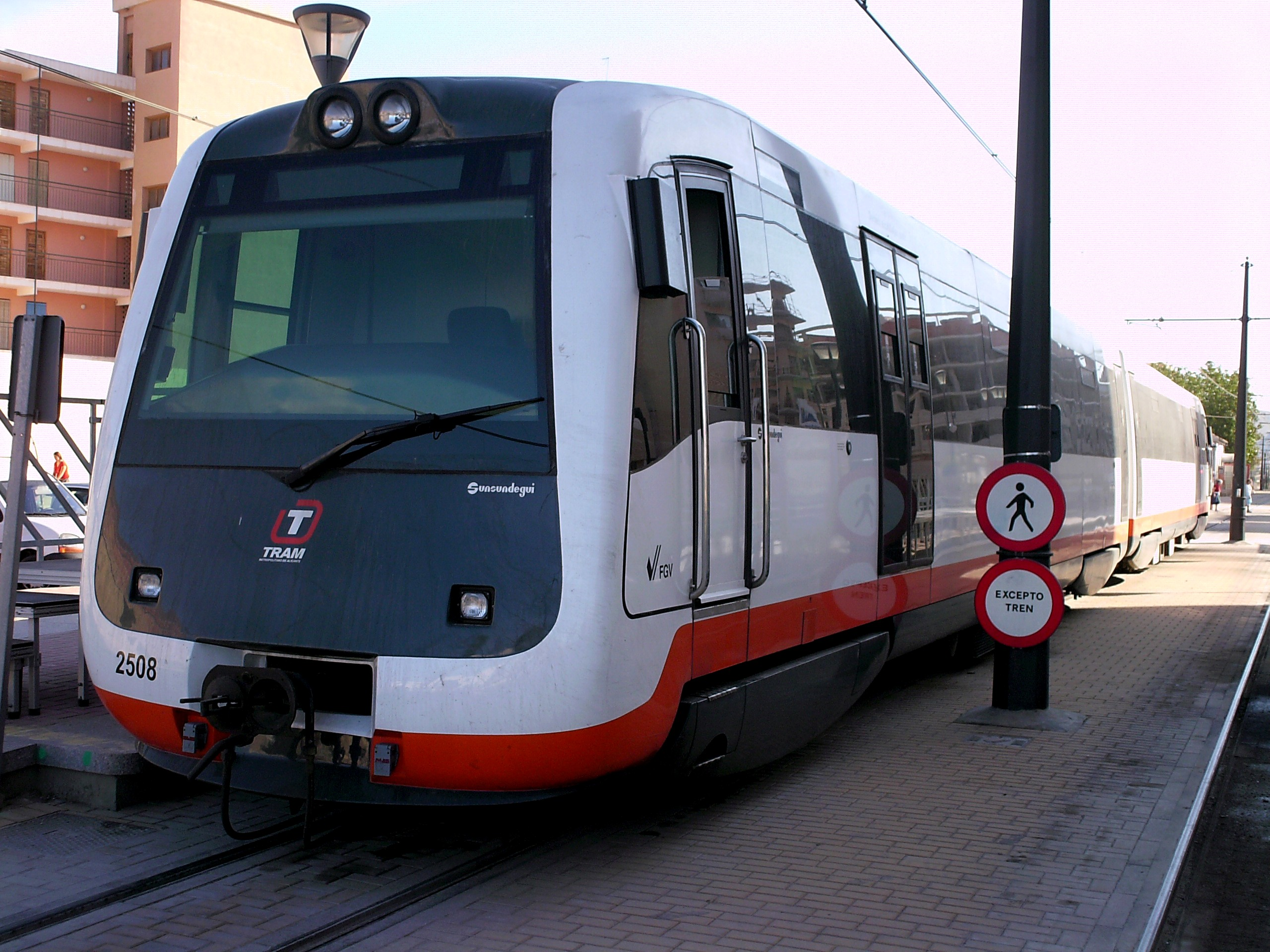 Dieseltriebwagen MAN Serie 2500 der Stadtbahn Alicante in El Campello / Diésel MAN série 2500 del TRAM Metropolità d'Alacant en la estación El Campello